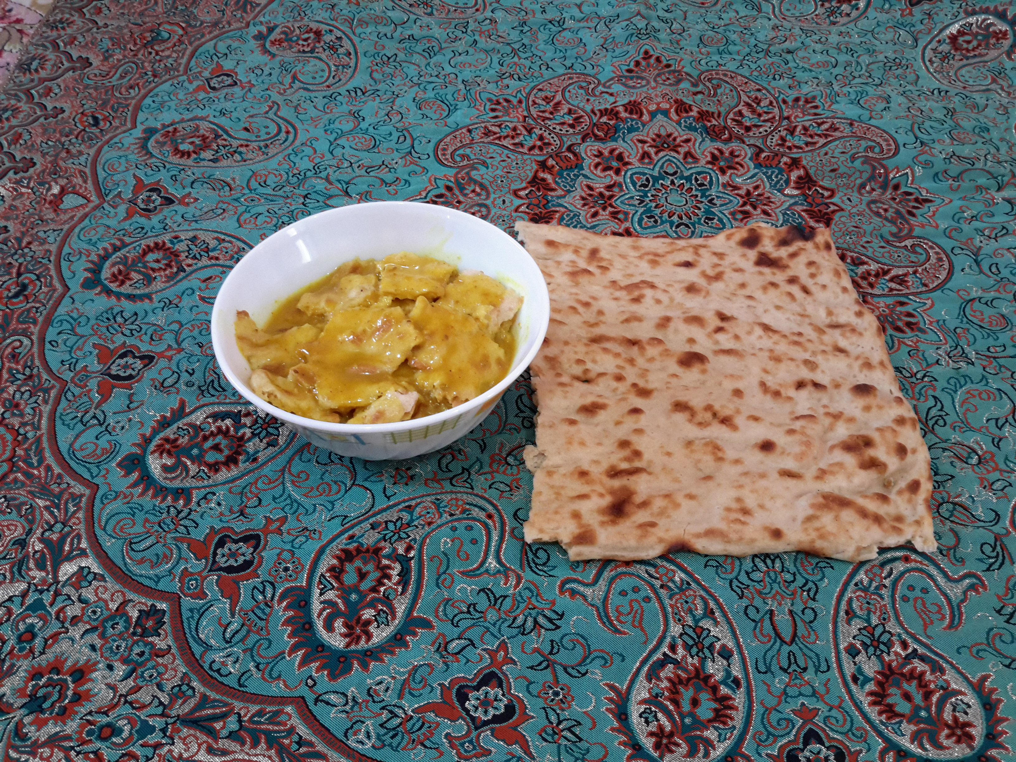 کشک زرد زابلی